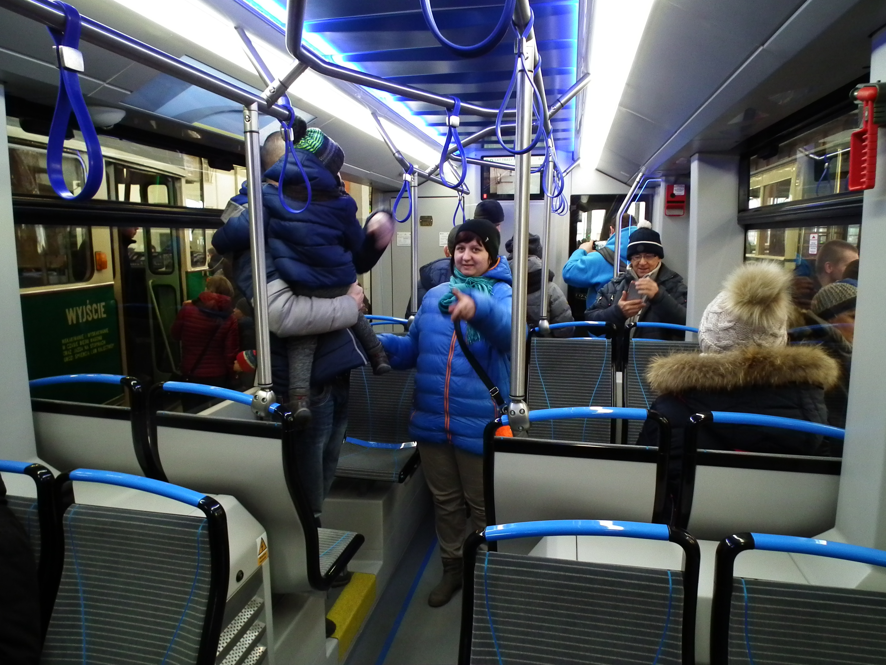 20-lecie otwarcia PST w Poznaniu. Zajezdnia Głogowska.